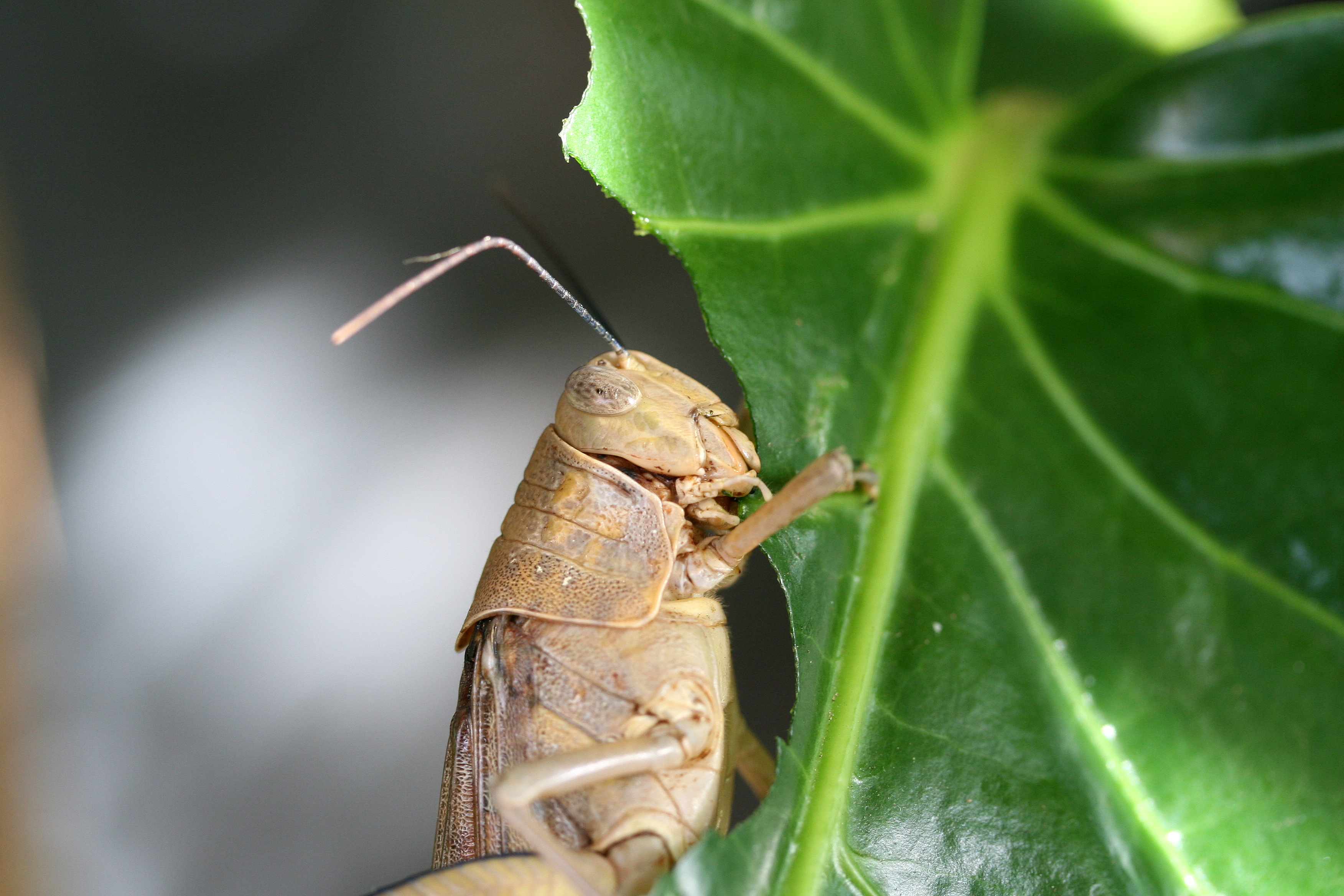 Giant Valanga (Valanga irregularis) eating a leaf.